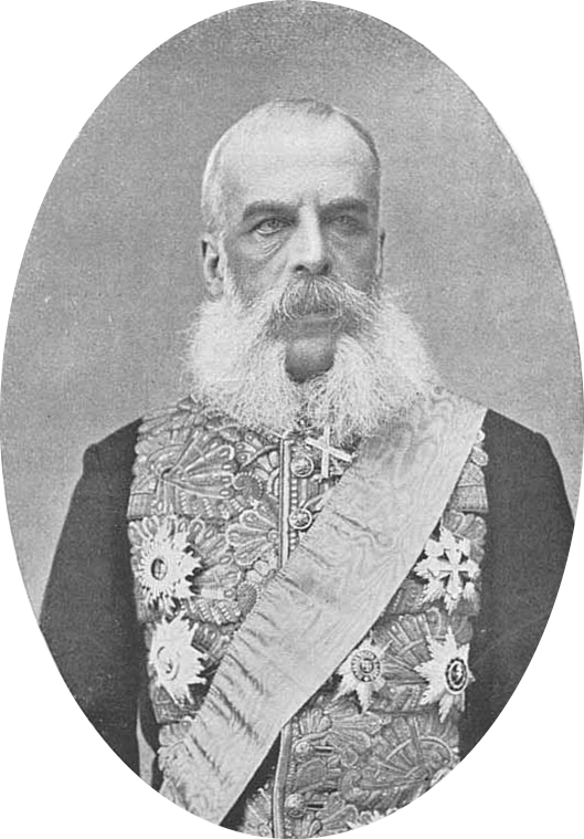 Князь Александр Сергеевич Долгорукий, член Государственного Совета.